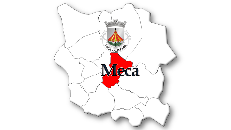 Evolução da População